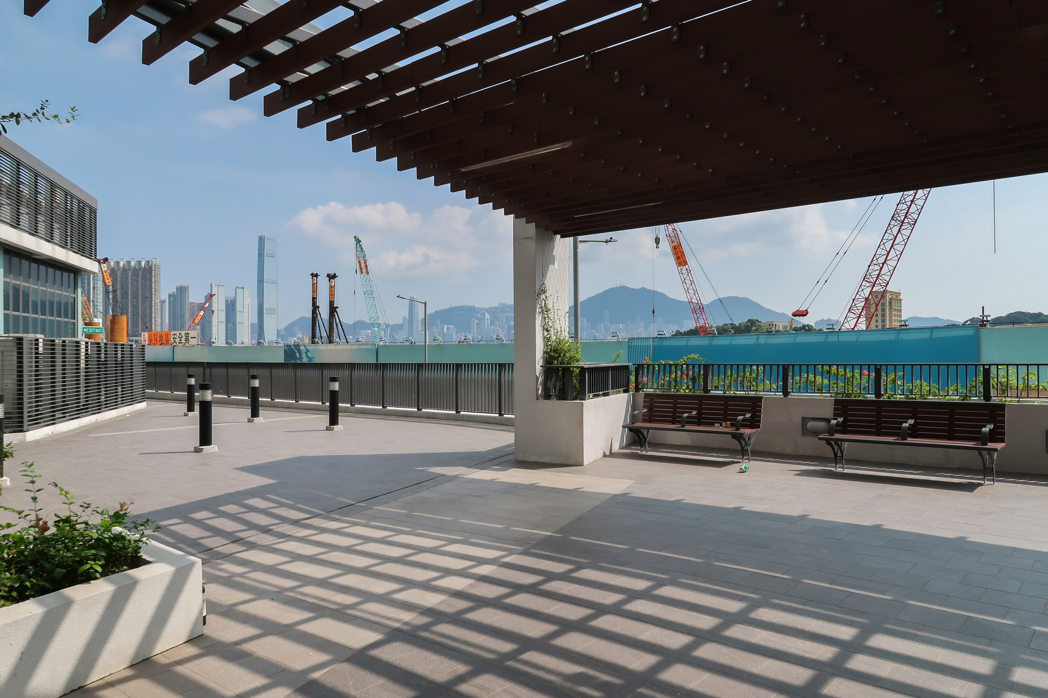 Hoi Ying Estate Level 1 podium